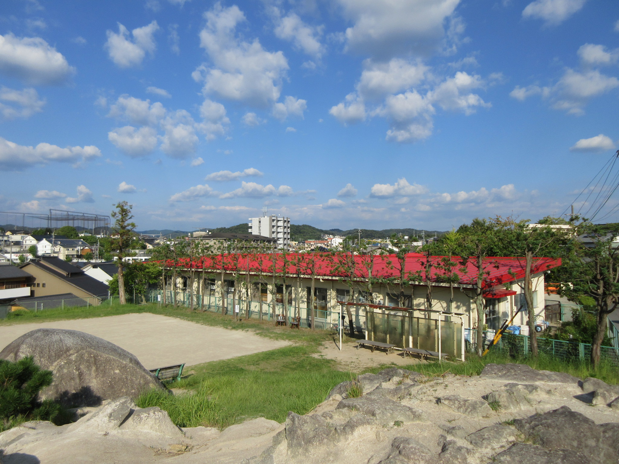 岡崎市井田保育園（岡崎市井田町）